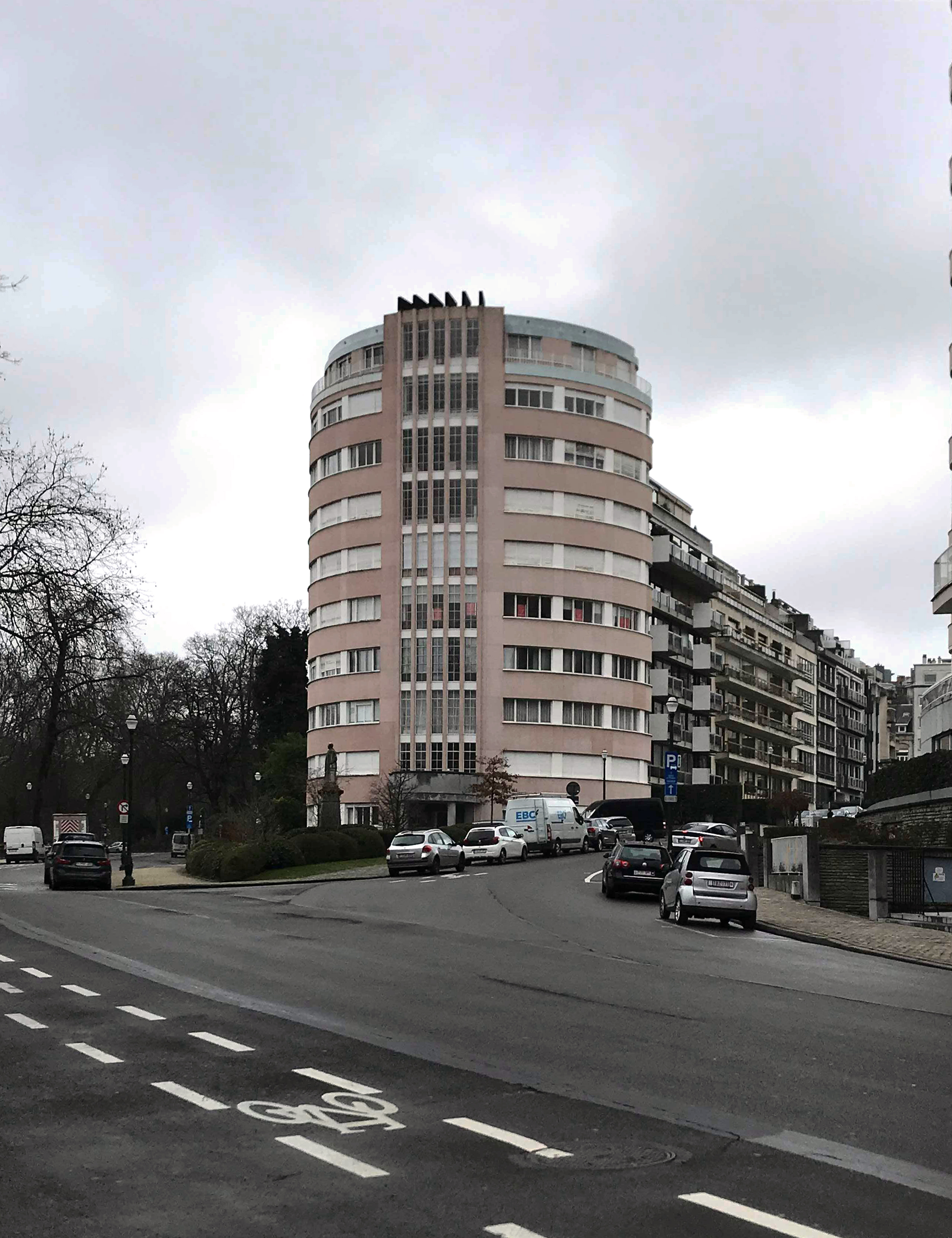 Photo du Tonneau aux Étangs d'Ixelles